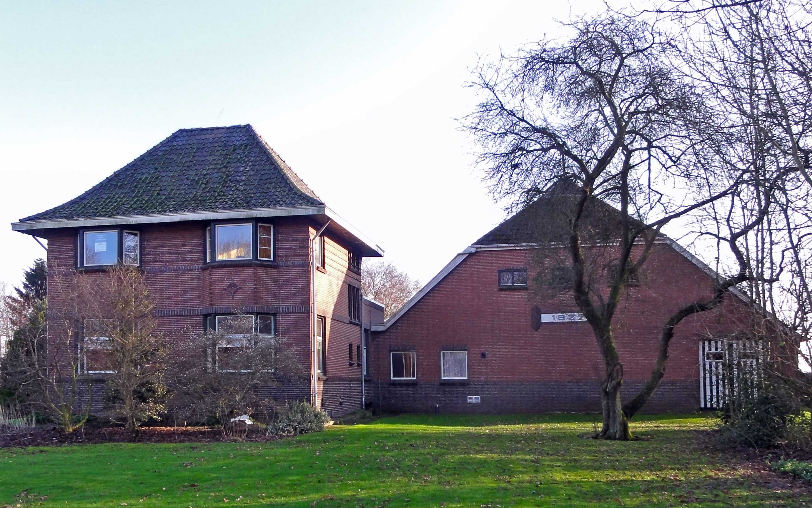 Villaboerderij Zuiderdiep 43 Tweede Exloërmond, provinciaal monument